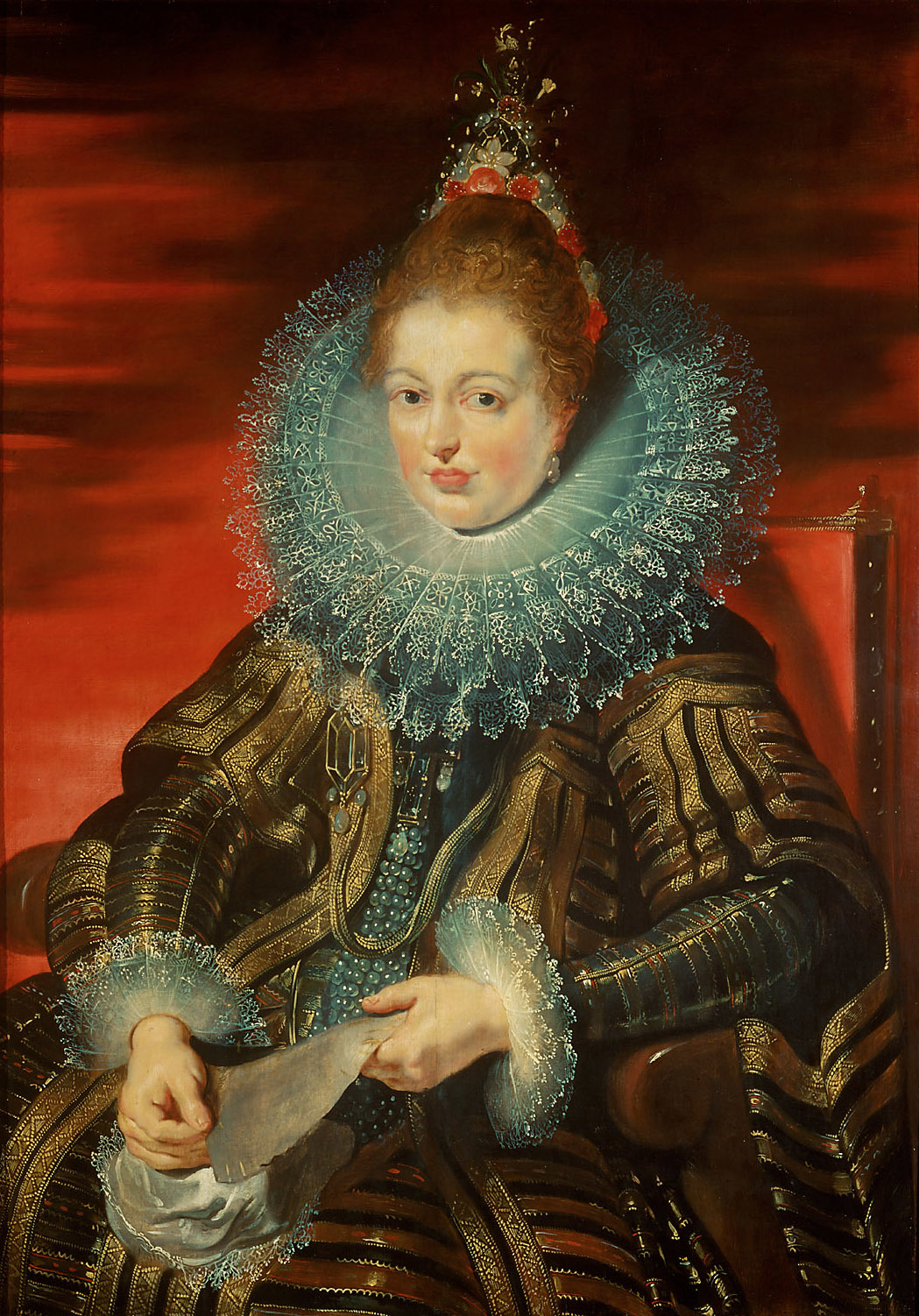 Infantin Isabella Klara Eugenia Tochter d. Philipp II. von Habsburg Spanien